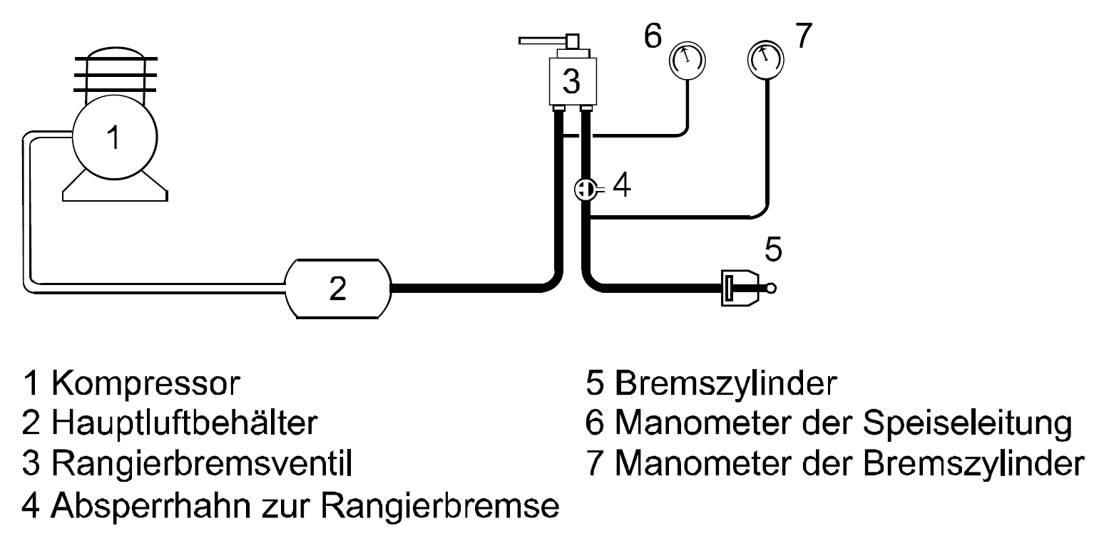 Die auf dem Triebfahrzeug oder Steuerwagen vorhandene direkt wirkende Luftbremse wird in der Schweiz als Rangierbremse bezeichnet. Sie wirkt auf das Triebfahrzeug bzw. auf den Steuerwagen und gegebenenfalls auf weitere Triebfahrzeuge in Vielfachsteuerung. In gewissen Fällen wird die Rangierbremse vom Steuerwagen aus elektropneumatisch angesteuert und kann in diesem Fall zusätzlich auch auf das Triebfahrzeug wirken. Die Rangierbremse wird mit dem Rangierbremsventil bedient, welches die Druckluft aus dem Hauptluftbehälter über einen Druckregler bezieht. Dieser ist, um Überbremsungen zu vermeiden, auf einen bestimmten Höchstdruck eingestellt. Mit der Rangierbremse kann beim Bremsen wie auch beim Lösen der Druck im Bremszylinder kontinuierlich reguliert werden